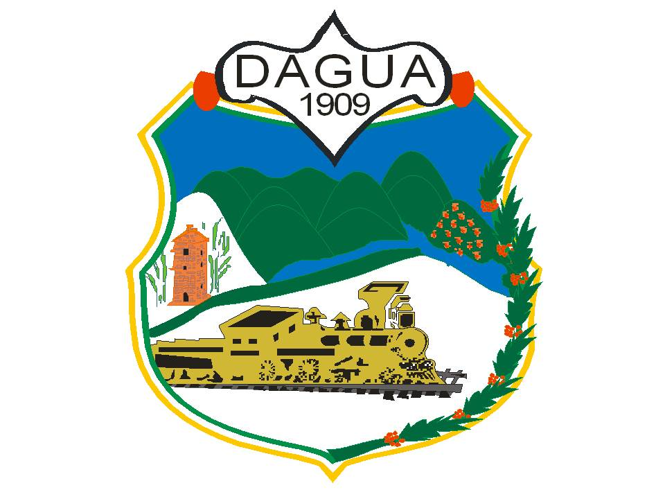 Simboliza la escarpada geografía que conforma al cañón del río Dagua y una locomotora en reconocimiento a la vía férrea la cual le dio origen y desarrollo al municipio.